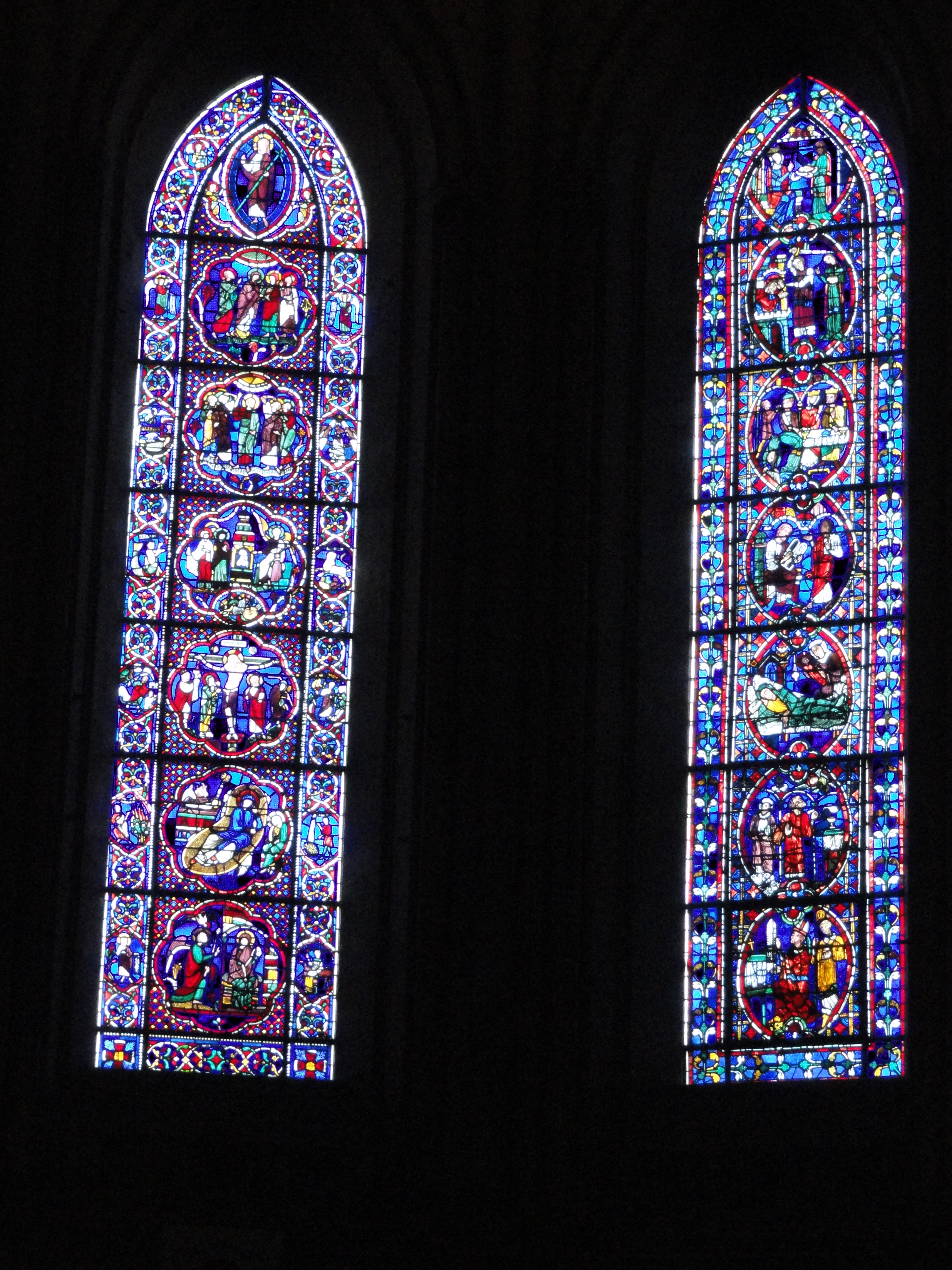 Cathédrale Saint-Jean de Lyon, Lyon, France.